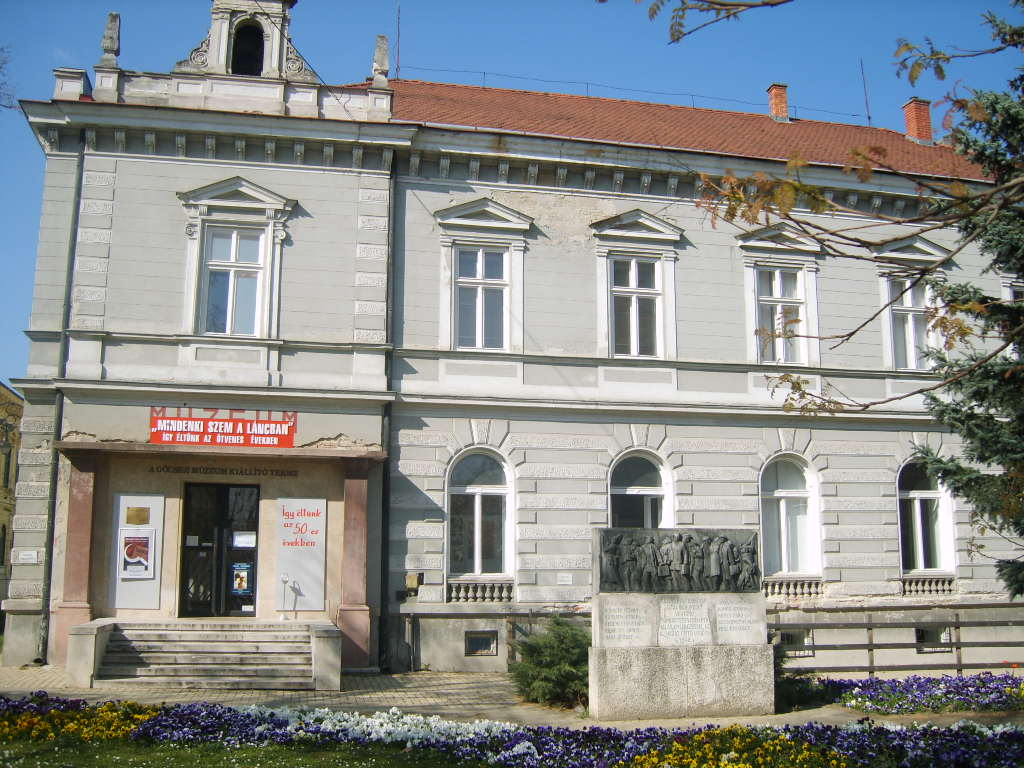 Göcsej Múzeum, Zalaegerszeg